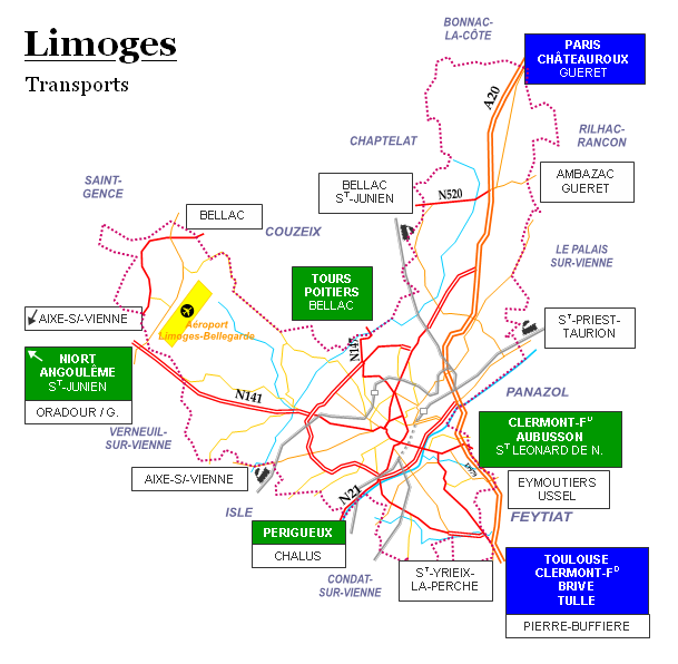 Carte des transports à Limoges, France